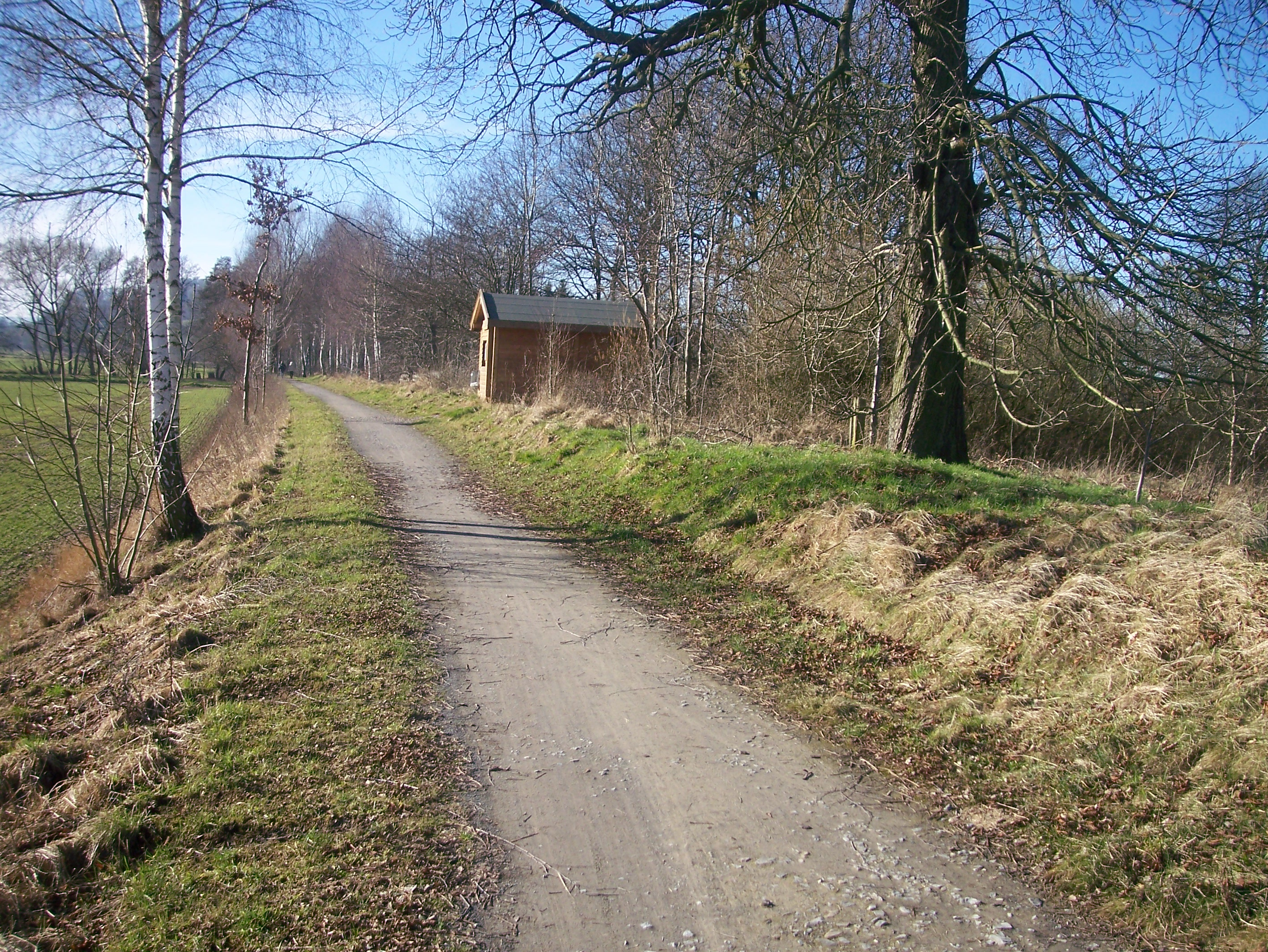 Ehemaliger Haltepunkt Selxen (Bahnstrecke Hameln-Lage)